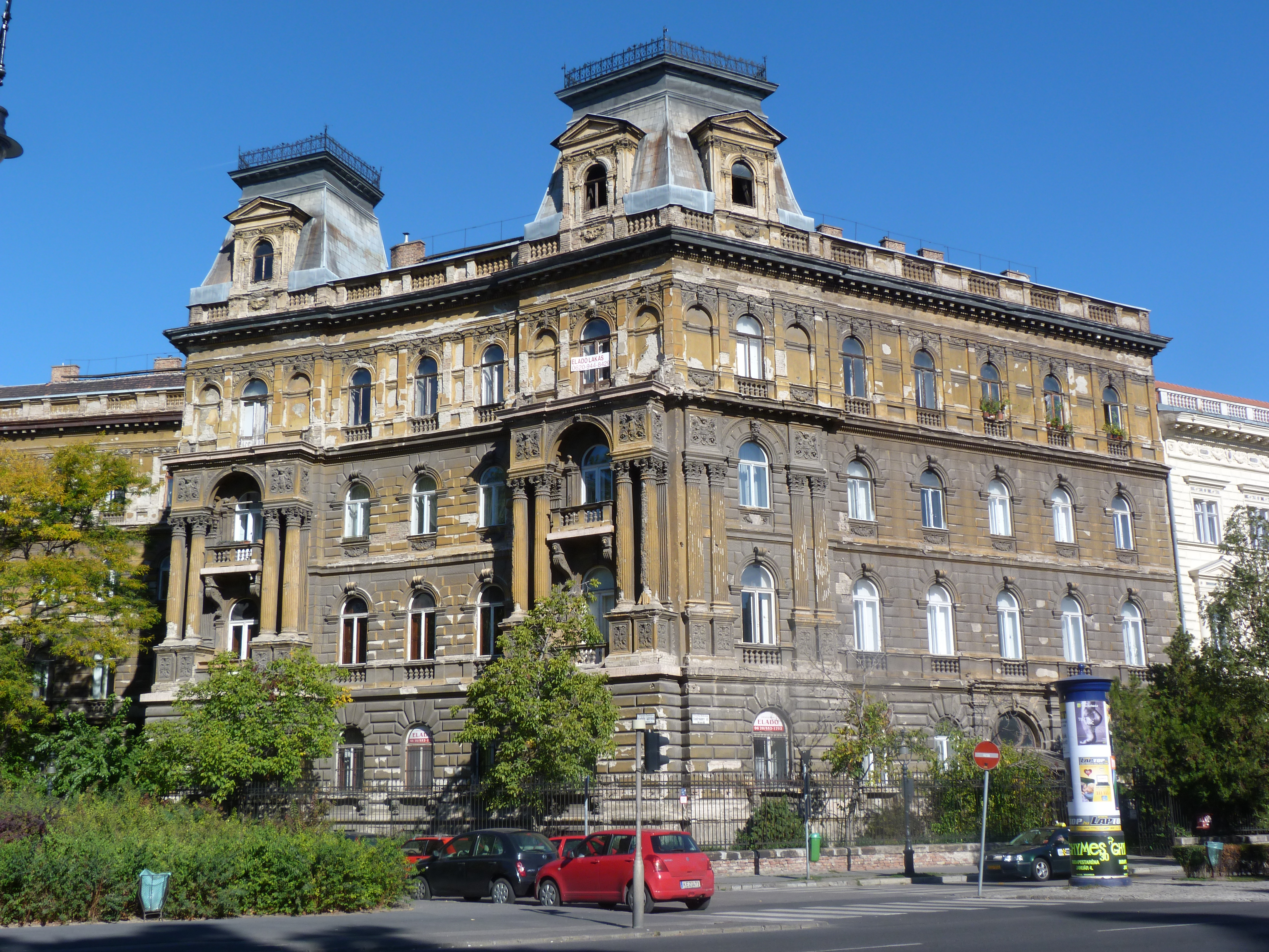 Andrássy út 92–94. Ún. Hübner-udvar (Bukovics Gyula, 1883–1884). Hübner Nándor részére épült. (Kodály Körönd 4 szám). - - ©© Derzsi Elekes Andor, Budapest, 2013, You are authorised to use these photos and vids under Creative Commons – even for commercial, for profit purposes. Photos must be attributed to Derzsi Elekes Andor. All of the photos and vids in the Metapolisz DVD line are under Creative Commons and can be used even for commercial – for profit – purposes. Recommended Citation Derzsi Elekes Andor: Metapolisz DVD line